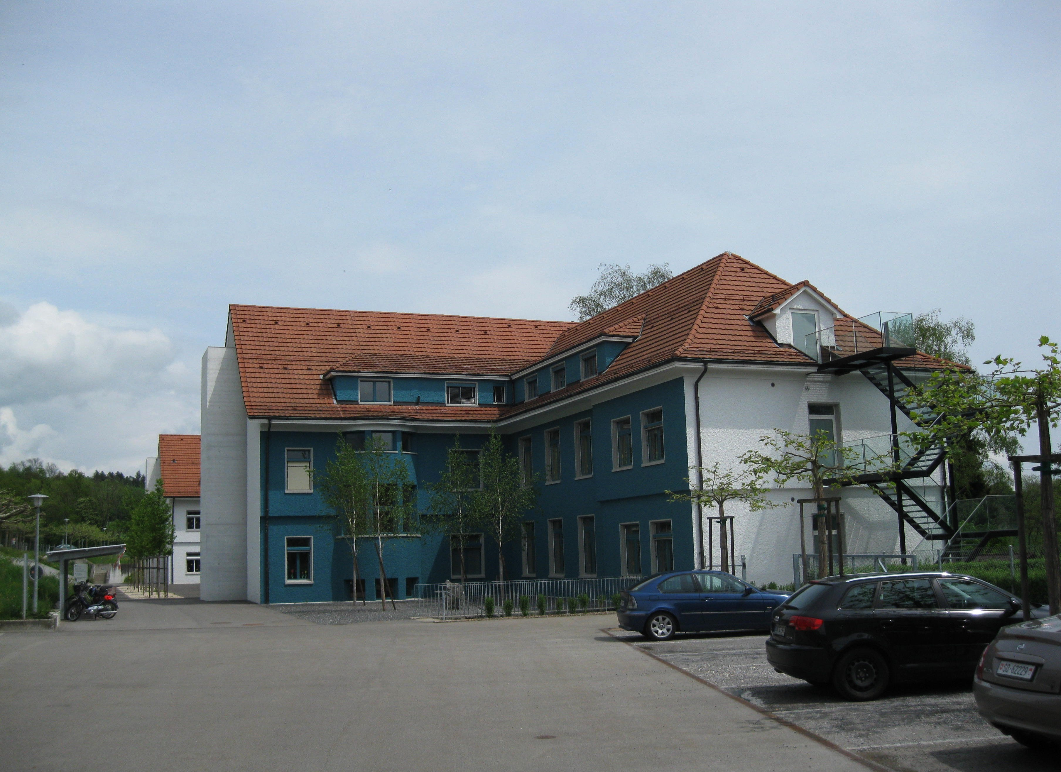 Psychiatrische Klinik Renovation 2010 Langendorf / Solothurn